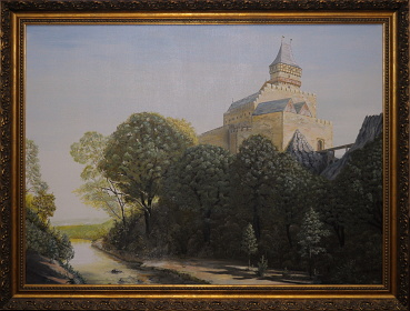 Hrad Gutštejn, olej na plátně 110x81 cm